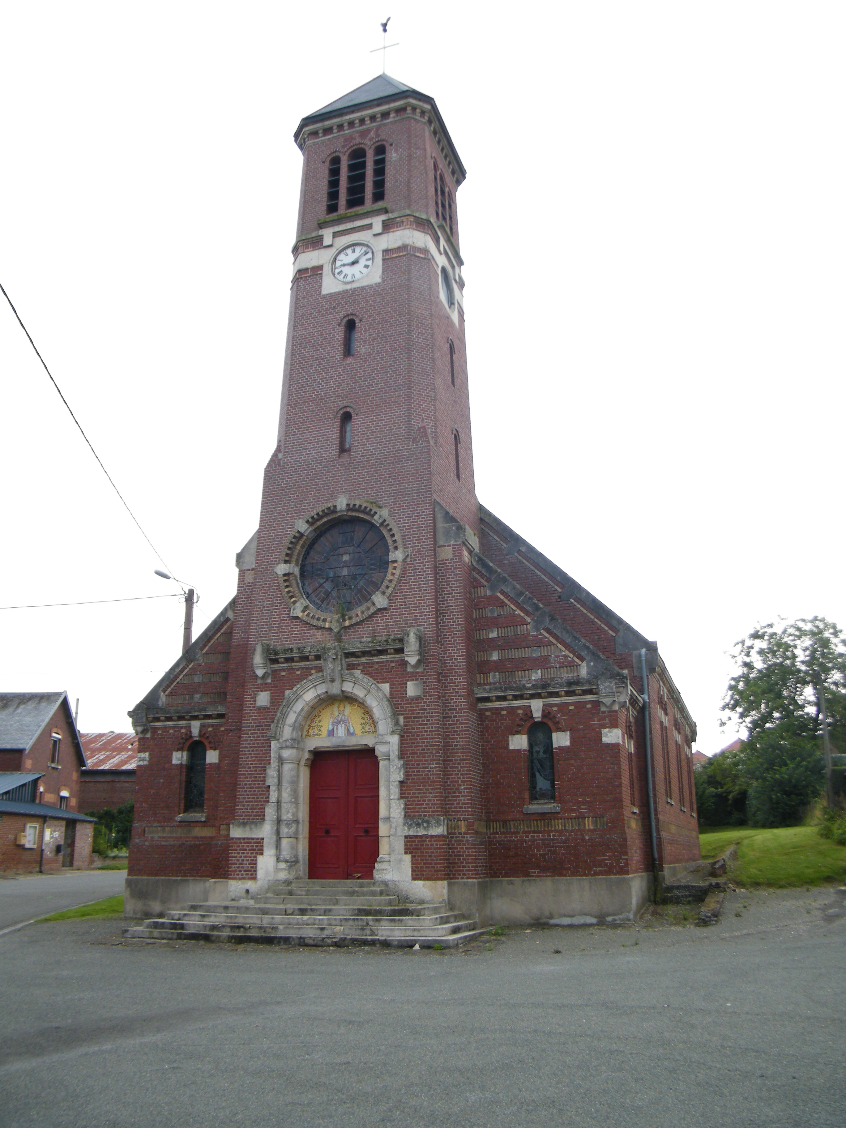 Eglise.